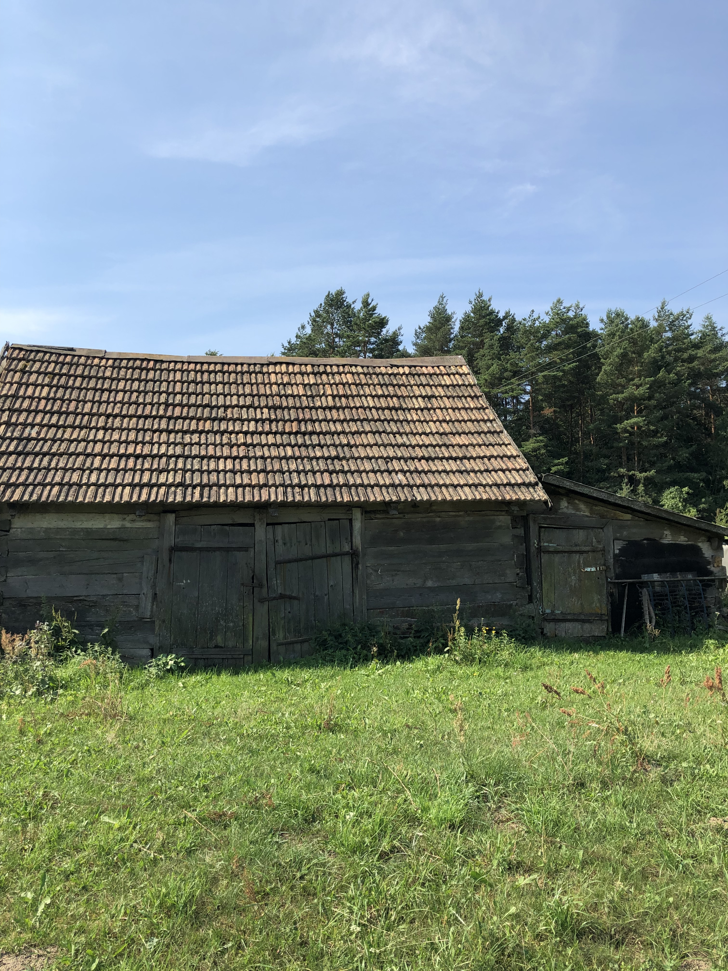 Гаспадарчая пабудова ў вёсцы Новікі Квасоўскага сельсавета Гродзенскай вобласці.